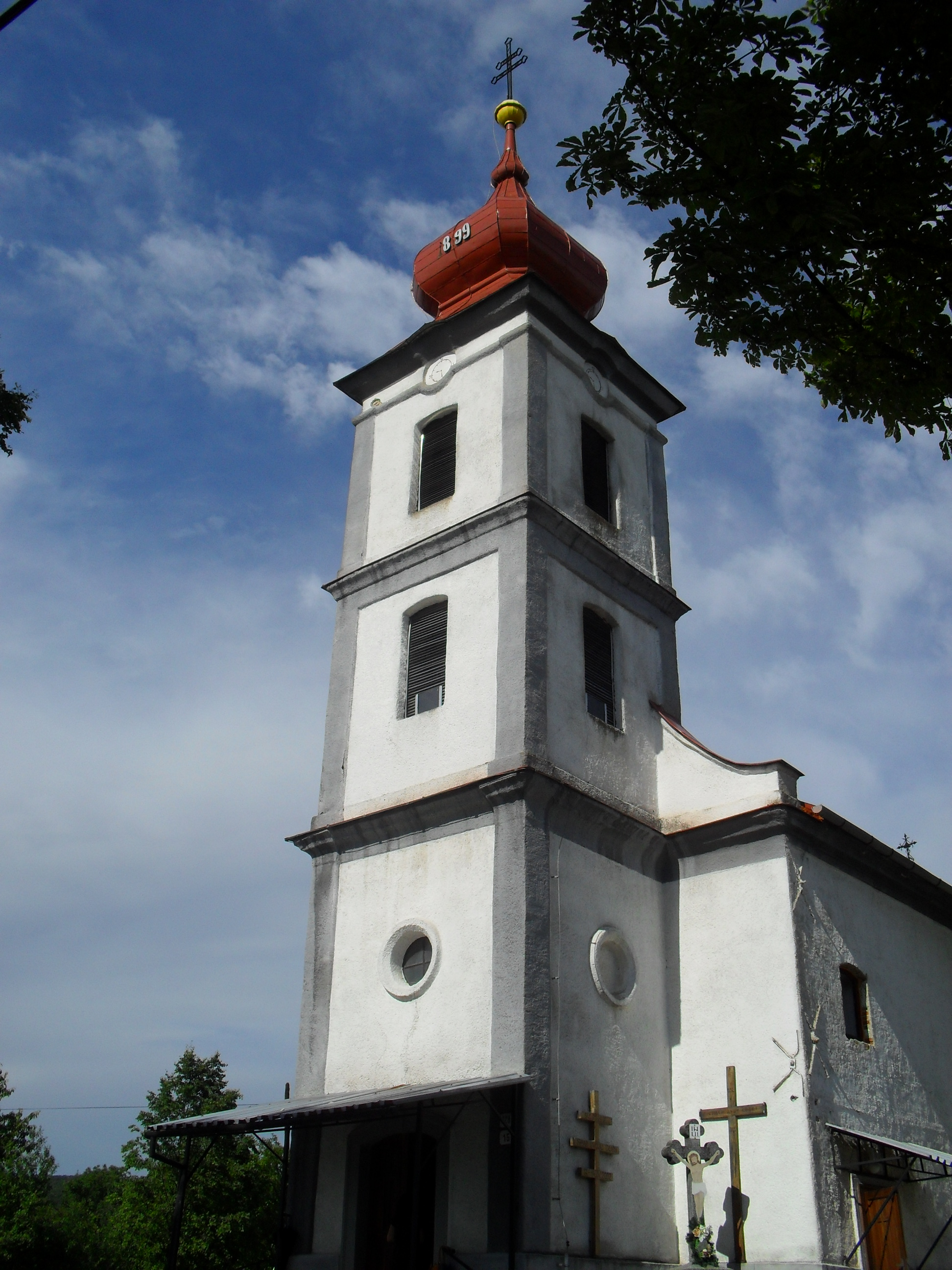 Nagytoronya - görög katolikus templom